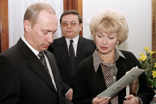 МОСКВА, ГОСУДАРСТВЕННЫЙ КОНЦЕРТНЫЙ ЗАЛ. С вдовой Анатолия Собчака Людмилой Нарусовой перед началом вечера памяти Анатолия Собчака.